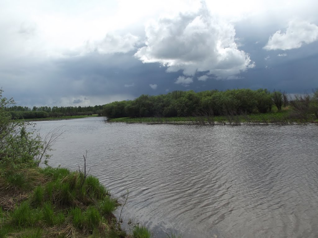 Река Мачтовая недплеко от Циммермановки